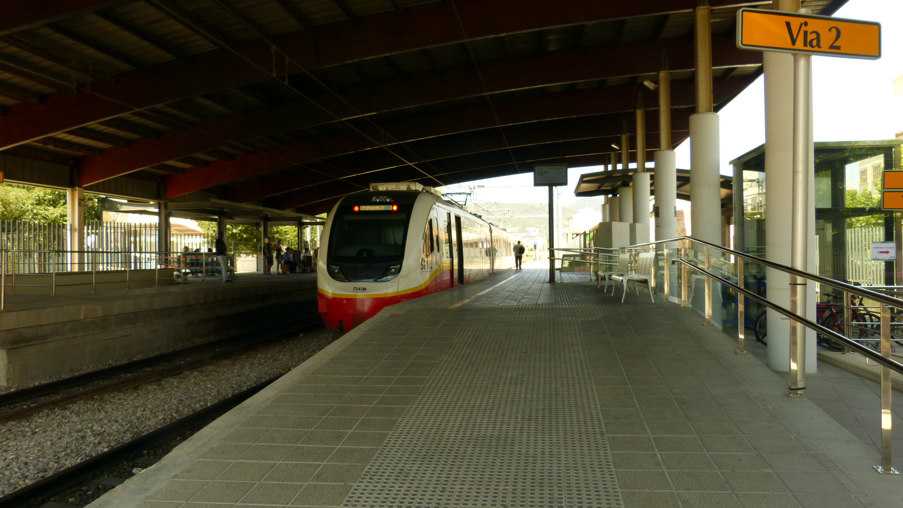 Bahnhof der Stadt Inca (Mallorca) mit dem Elektrotriebwagen 81-06 der SFM auf der Fahrt nach Palma